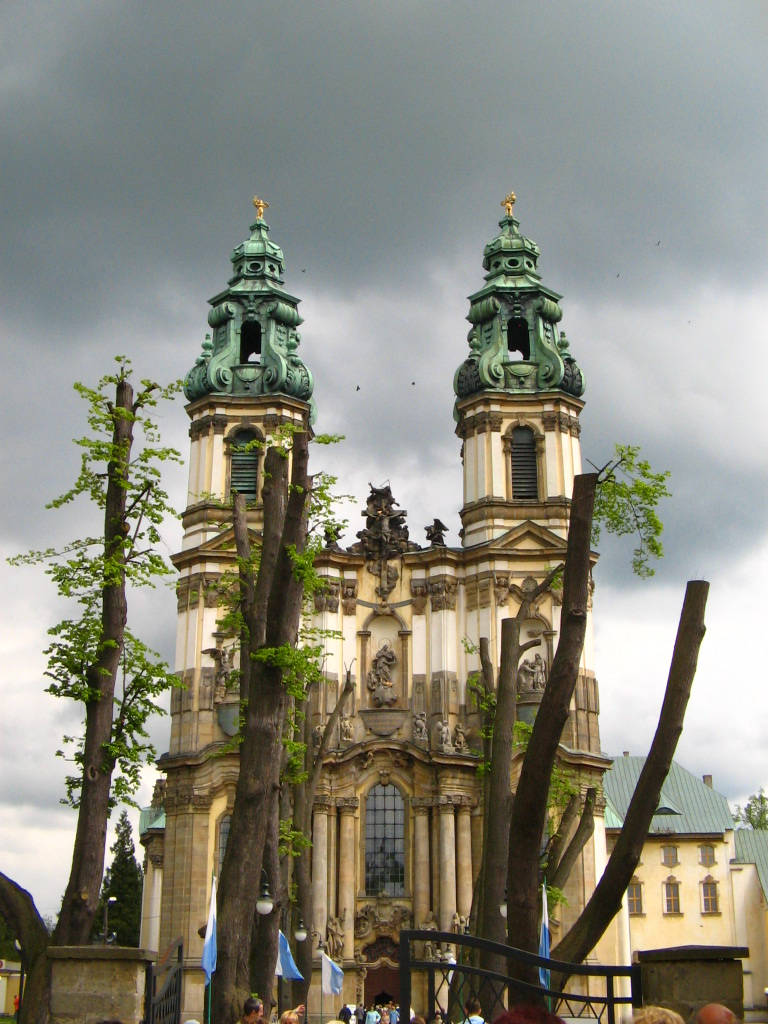 Opactwo Cysterskie w Krzeszowie.